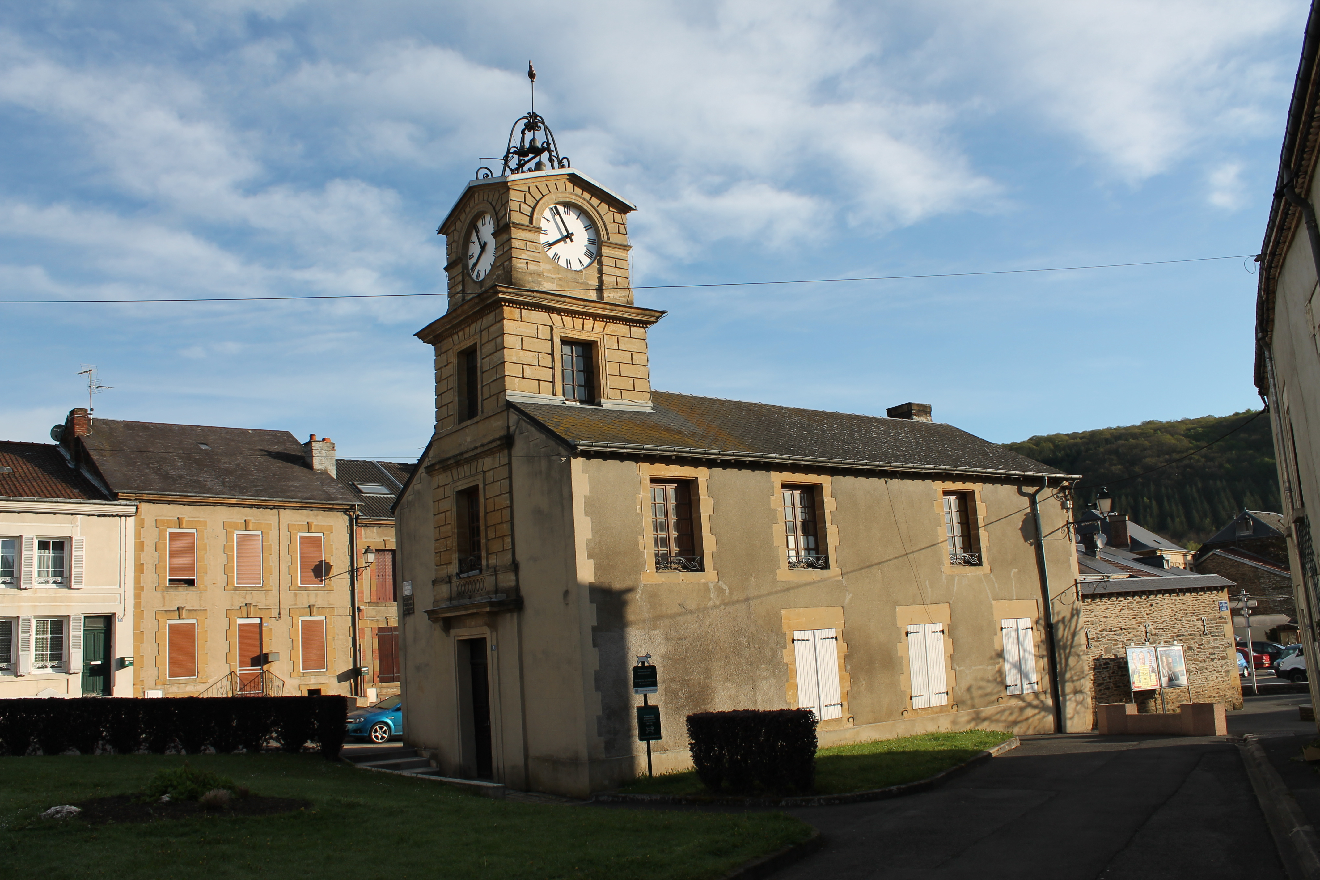 Ancienne mairie de Neufmanil (08)